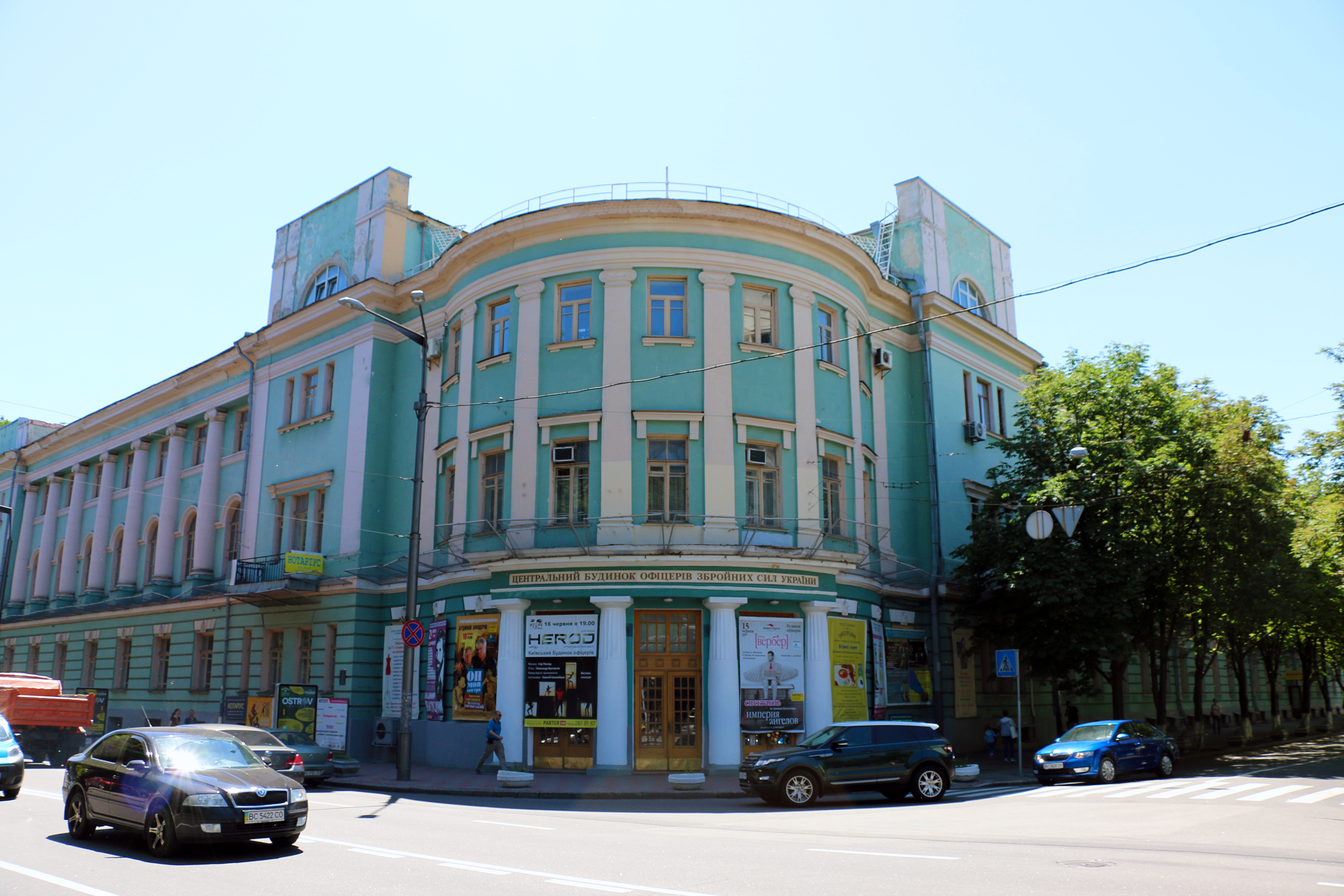 Будинок Військової школи, Київ, Грушевського Михайла вул., 30/1